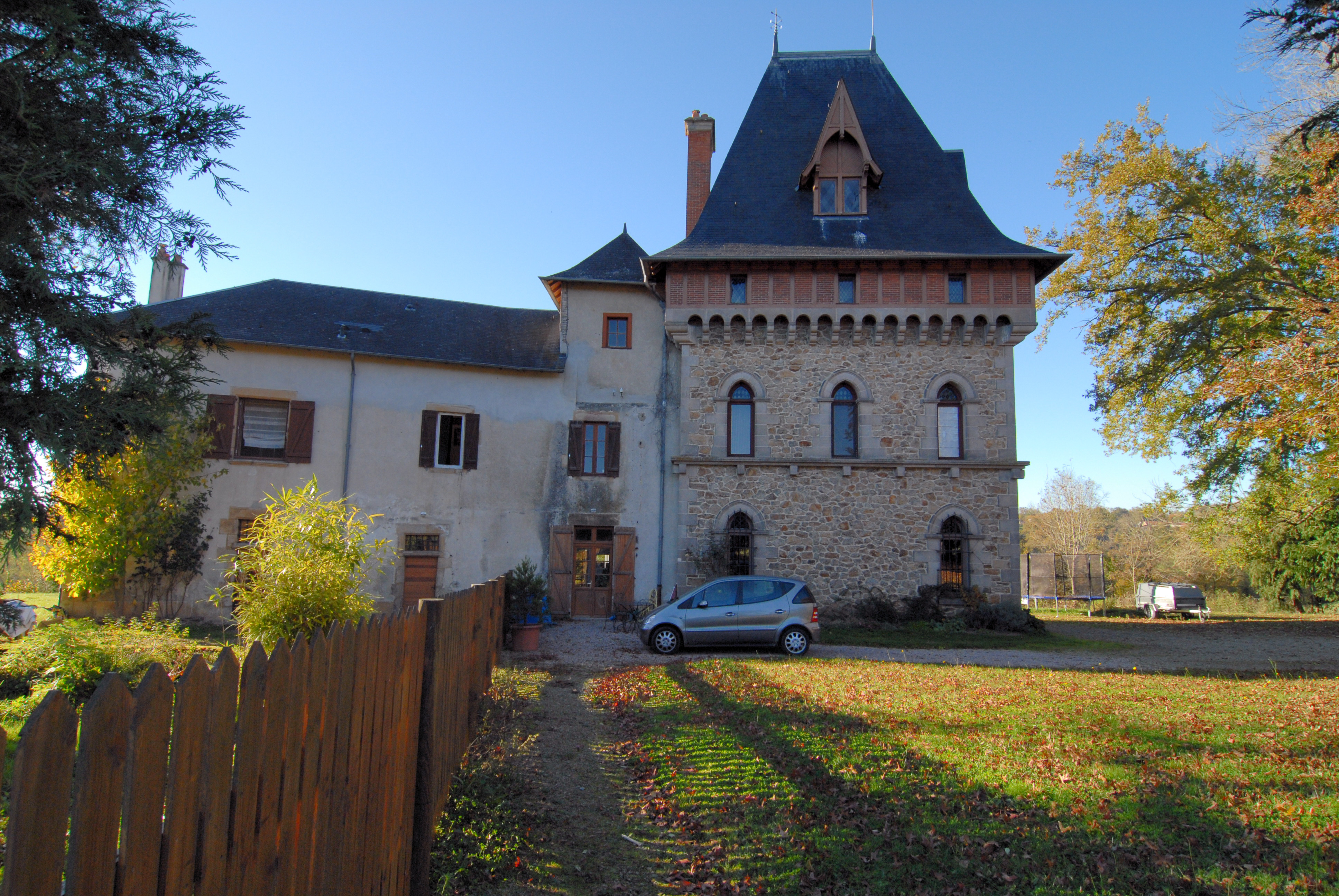 Château de Gigondas Commune d'Isle (Haute Vienne)